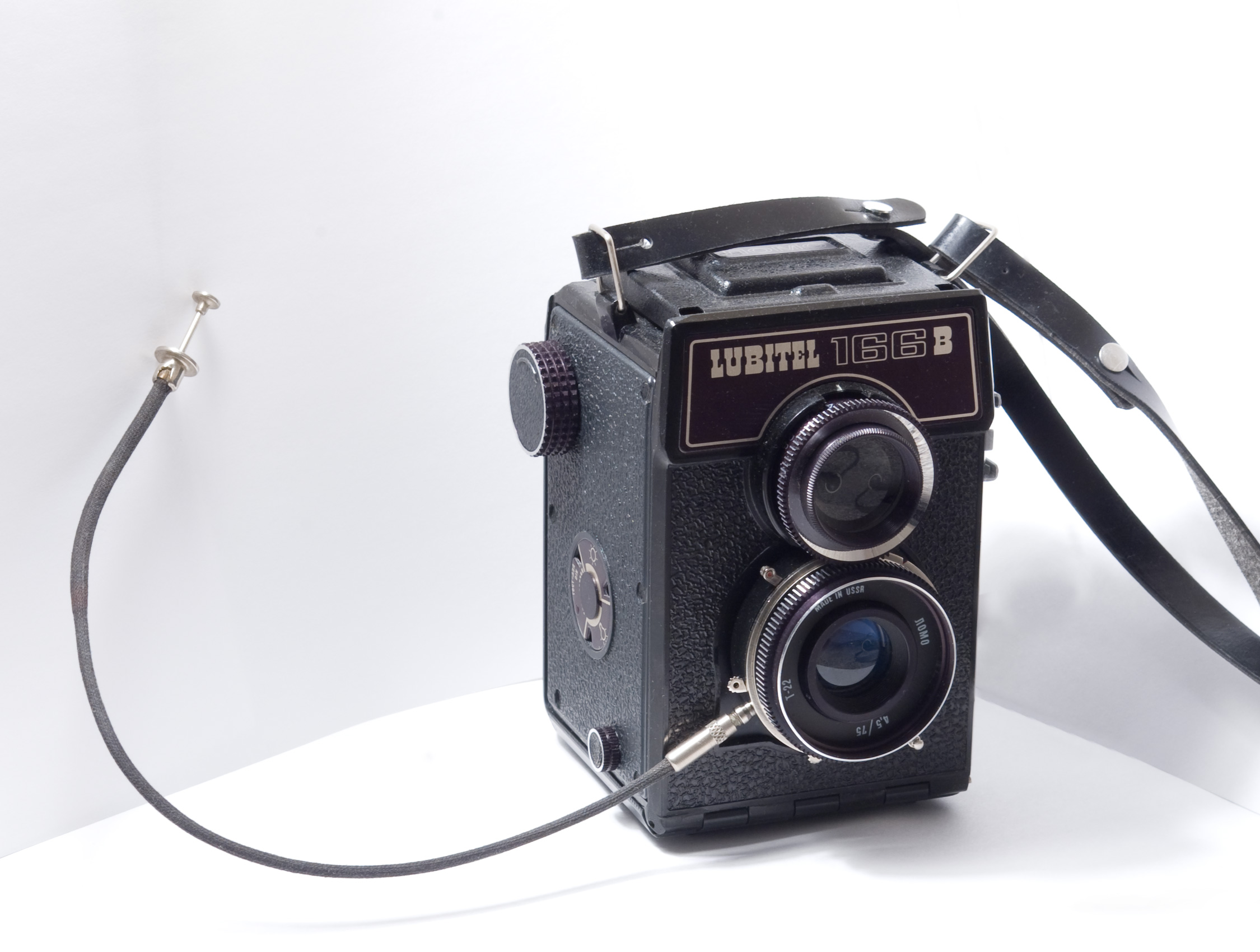 Спусковой тросик, присоединённый к зеркальному двухобъективному фотоаппарату "Любитель 166B"